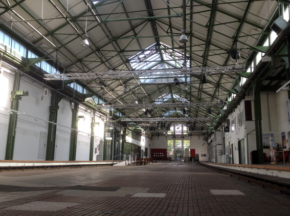 Die große Innenhalle des Depot mit Deckenkonstruktion. Ansicht nach Süden.